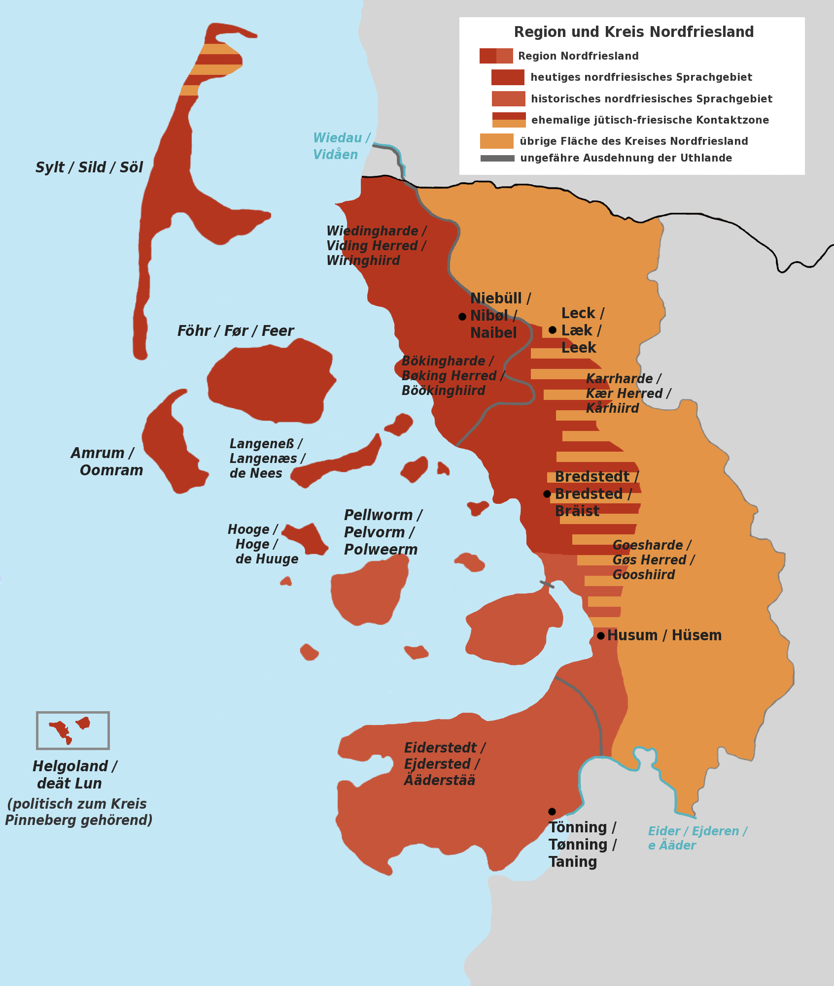 Unterschied zwischen der Region Nordfriesland (=nordfriesisches Siedlungs- und Sprachgebiet) und dem größeren Kreis Nordfriesland als Verwaltungseinheit unter Einbeziehung der jütisch-friesischen Kontaktzone und der ungefähren Grenze der Uthlande. Quellen: Nils Århammar: Das Nordfriesische im Sprachkontakt (unter Einschluss der nordfriesischen Lexikologie). In: Horst Haider Munske (Hrsg.): Handbuch des Friesischen, Tübingen 2001, S. 313–353. Anders Bjerrum: Vort sprogs gamle sydgrænse. In: Poul Kürstein: Nørre- og Sønder Gøs Herred, Flensborg 1969, S. 44-58